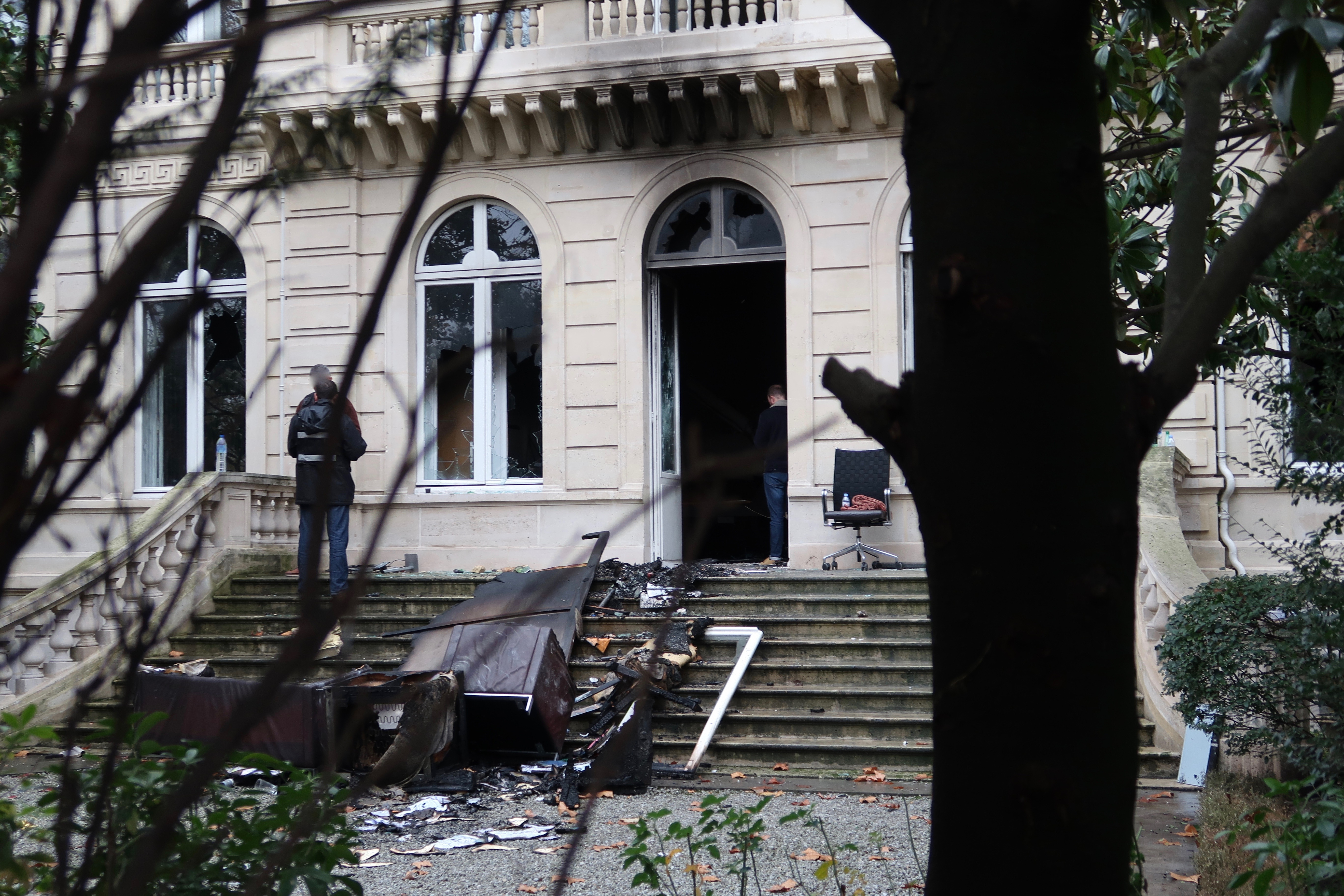 Hôtel particulier vandalisé à l'angle de la place Charles-de-Gaulle et de l'avenue Victor-Hugo (Paris, 16e). Photo prise le lendemain de la manifestation du mouvement des Gilets jaunes du 1er décembre 2018.